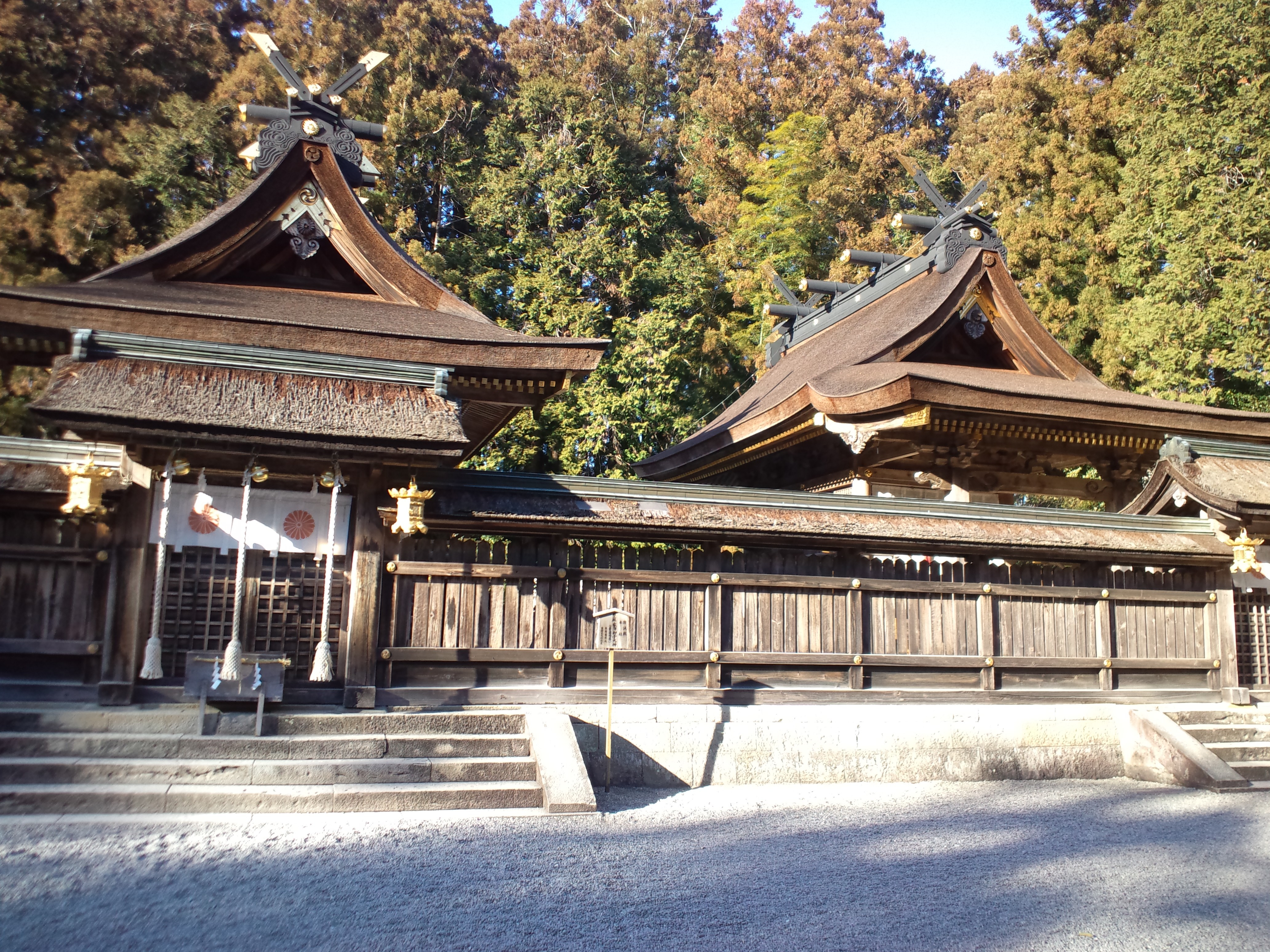 熊野本宮大社 社殿 證証殿と若宮